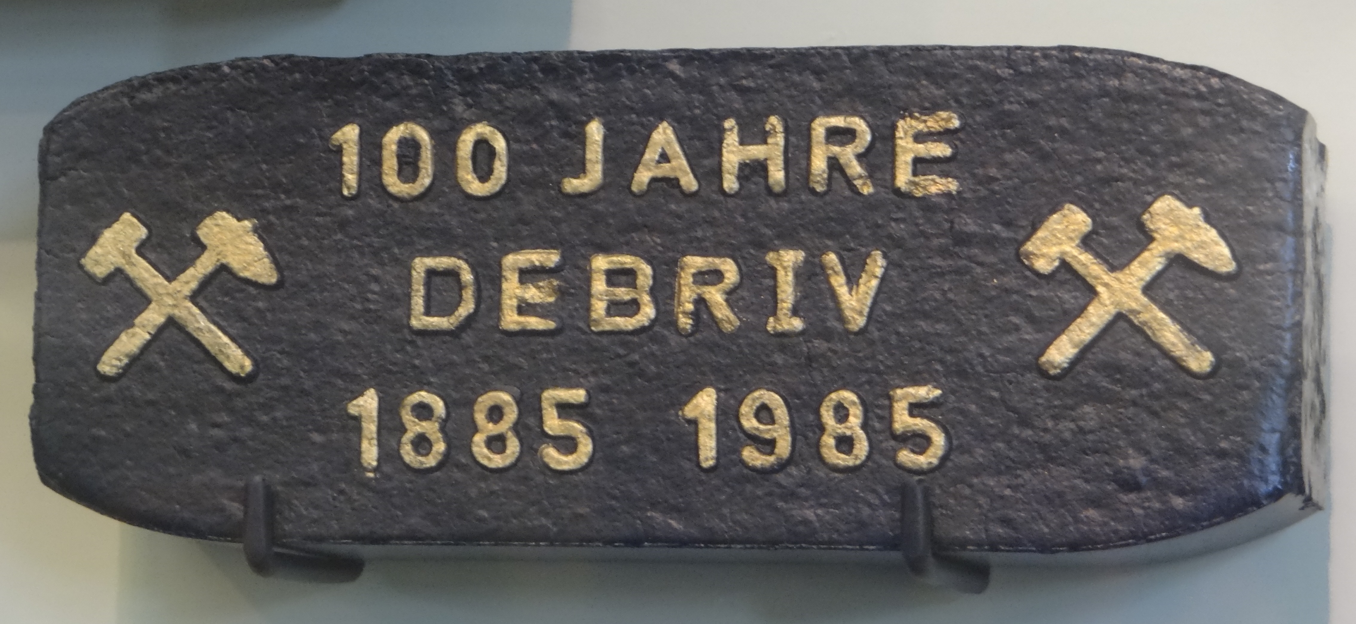 Deutsches Bergbau-Museum Bochum. Halle 19: Aufbereitung und Rohstoffveredlung. Kohlebrikettierung: Schmuckbriketts